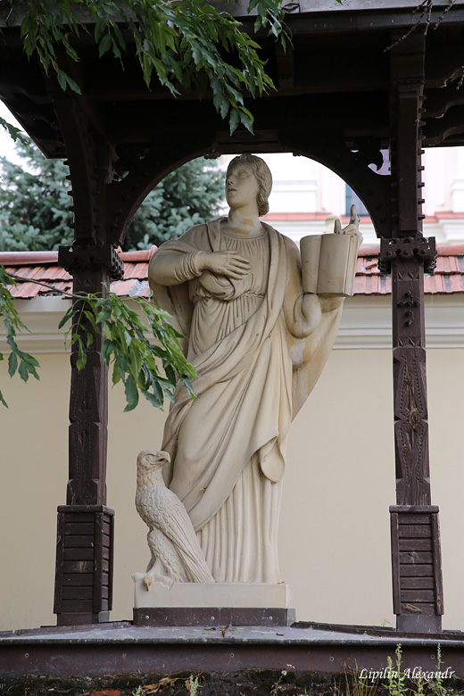 Пінскі кляштар францысканцаў. Помнік